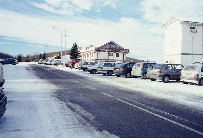 Monte cucco nelle stagioni invernali